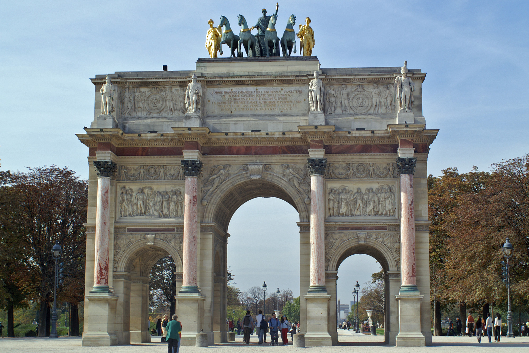 Arc de Triomphe du Carrousel - Paris